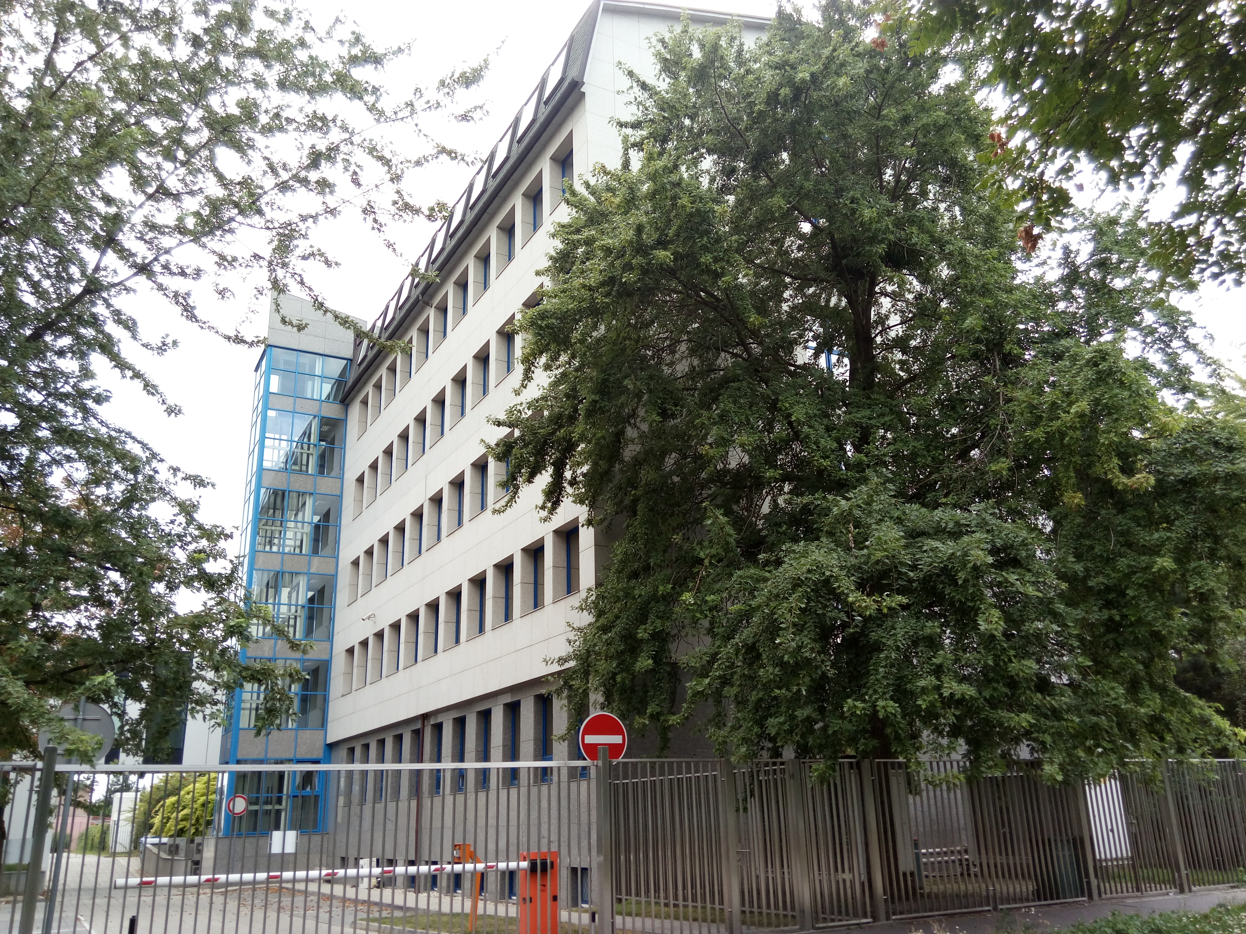 Votrubova 1, Ružinov, Bratislava